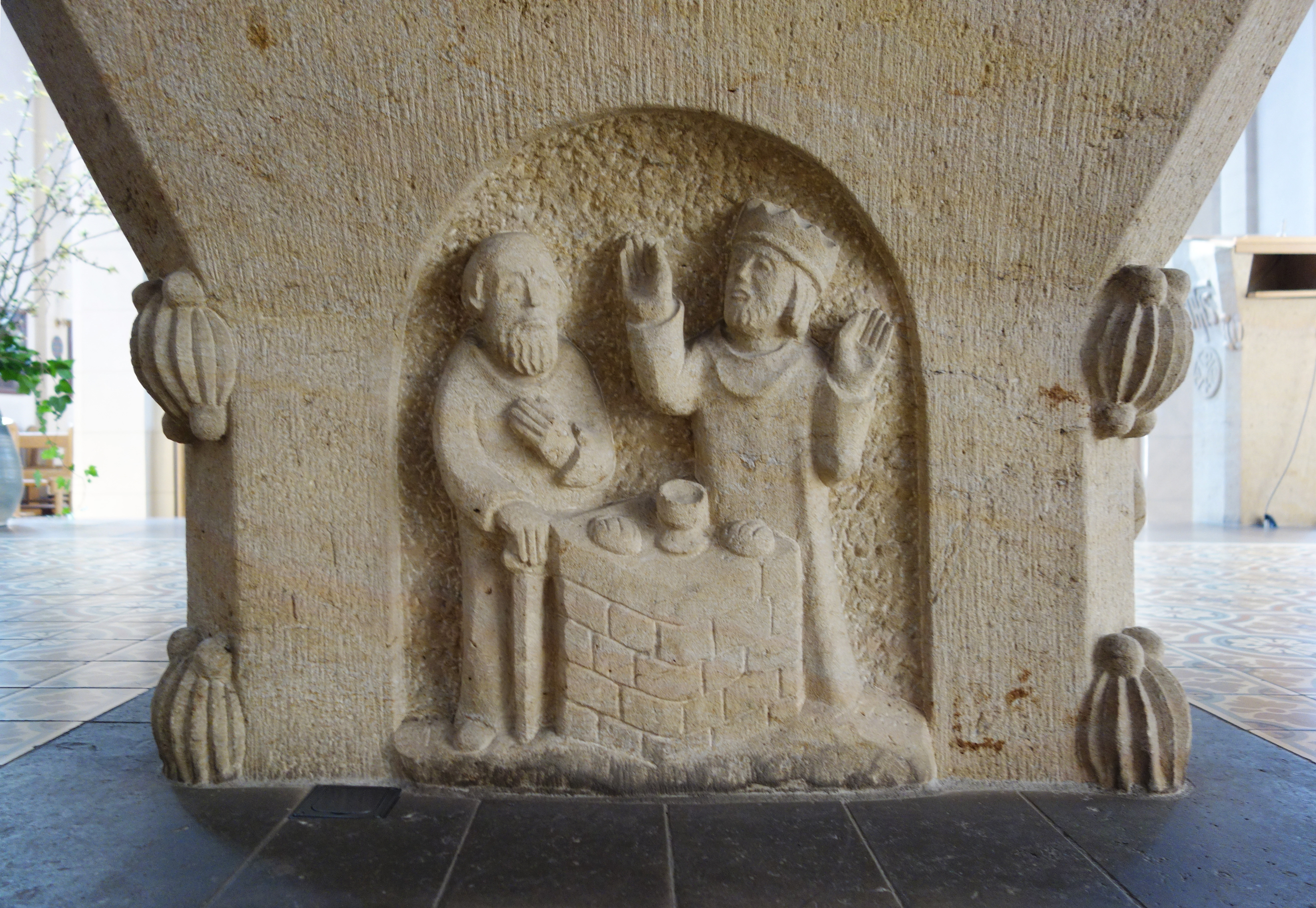 Pfarrkirche St. Maria-St. Vicelin, Neumünster, Rückseite des Altars